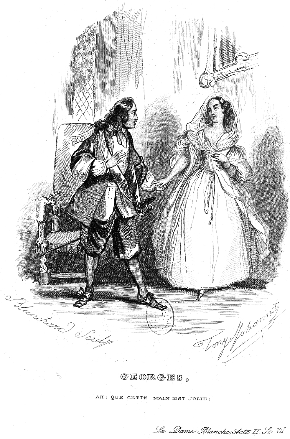 Théâtre de Scribe, tome 6, page 248 - La Dame blanche